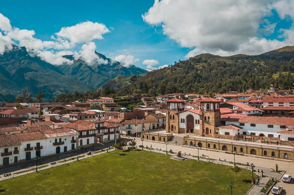 Casco histórico de Chacas, Asunción, Ancash, Perú